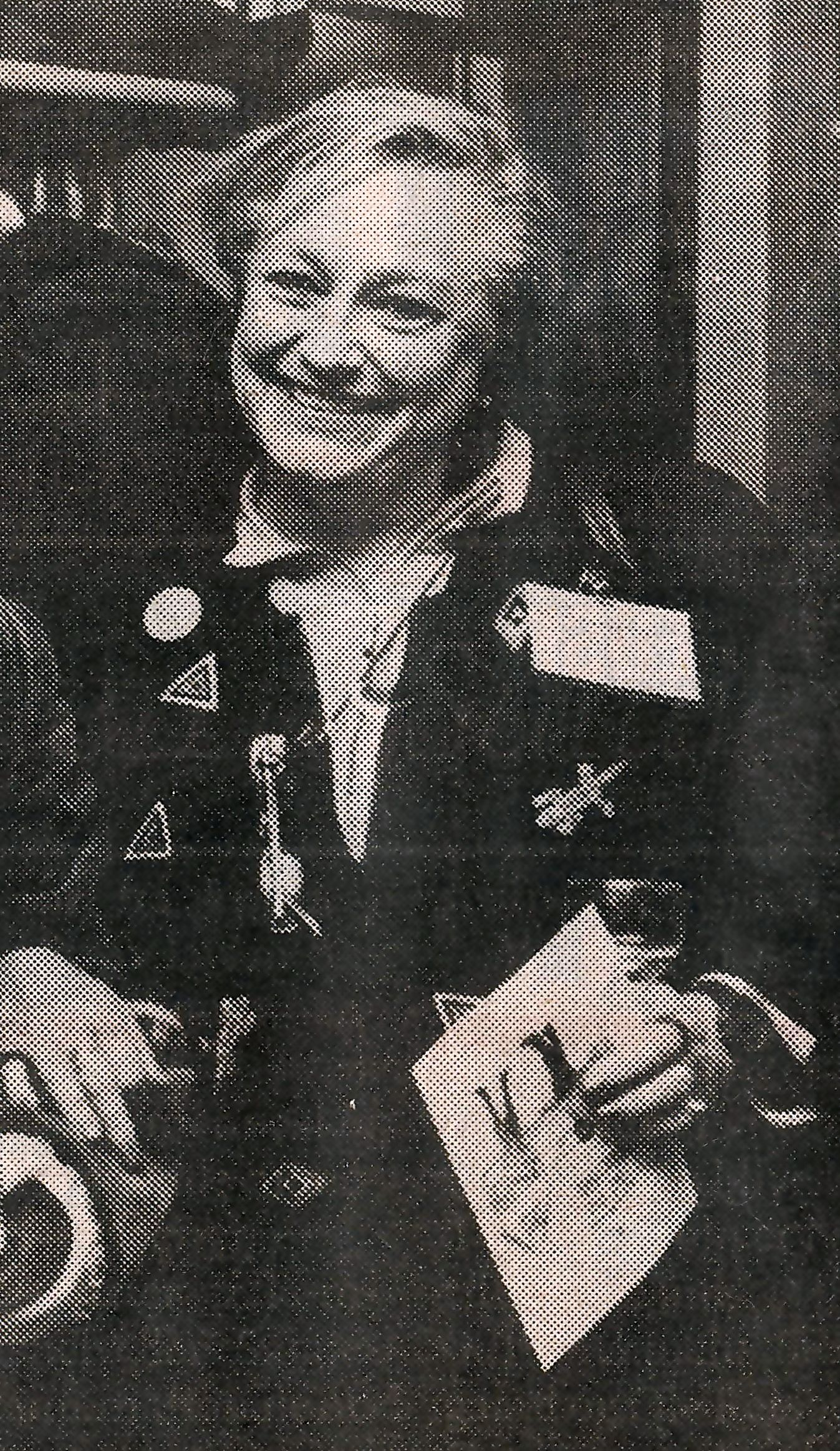 Skuespiller og teaterinstruktør Birgitte Price under besøg i Frederikshavn i november 1992.